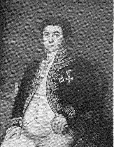 De Jean-Georges Willmar. (Collection Musée de l'État)